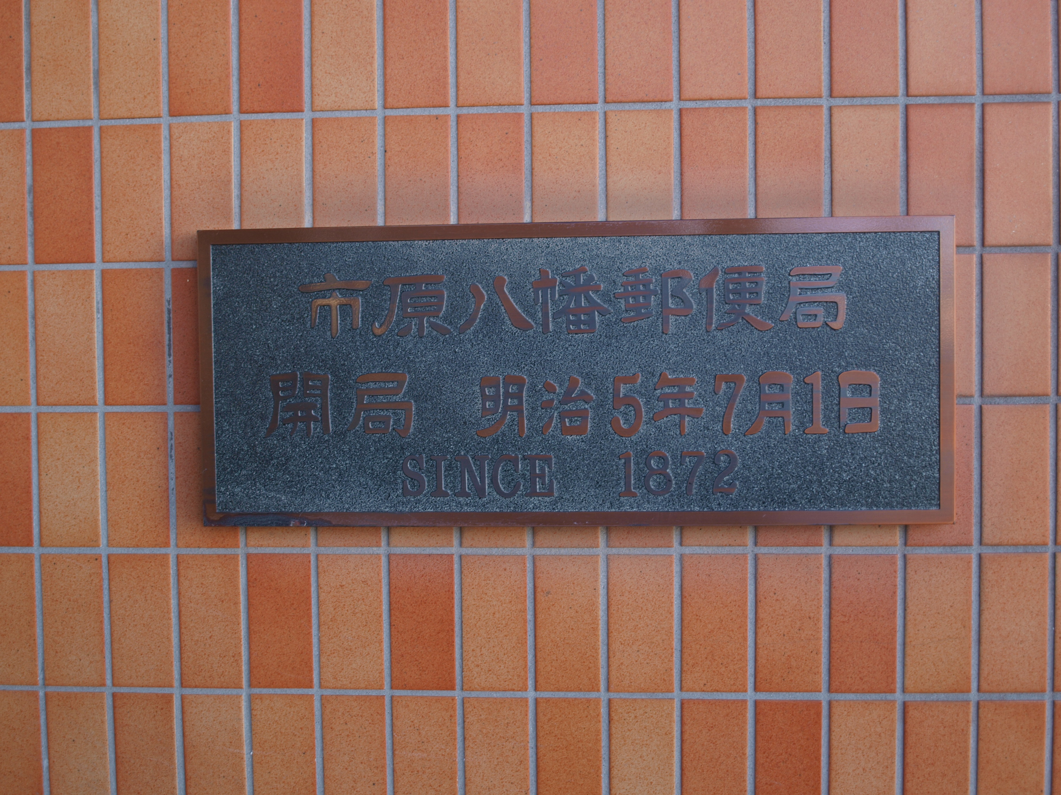 市原八幡郵便局公衆側入り口前に掲げられた 開局日を表示したプレート